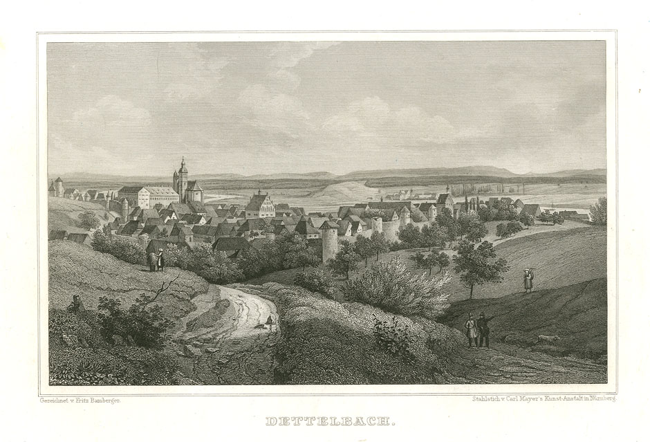 Dettelbach. Stahlstich nach Vorzeichnung von Fritz Bamberger, 1847, aus: Ludwig Braunfels; Die Mainufer und ihre nächsten Umgebungen. Verlag Carl Etlinger, Würzburg 1847. Gedruckt in der Kunstanstalt von Carl Mayer, Nürnberg.